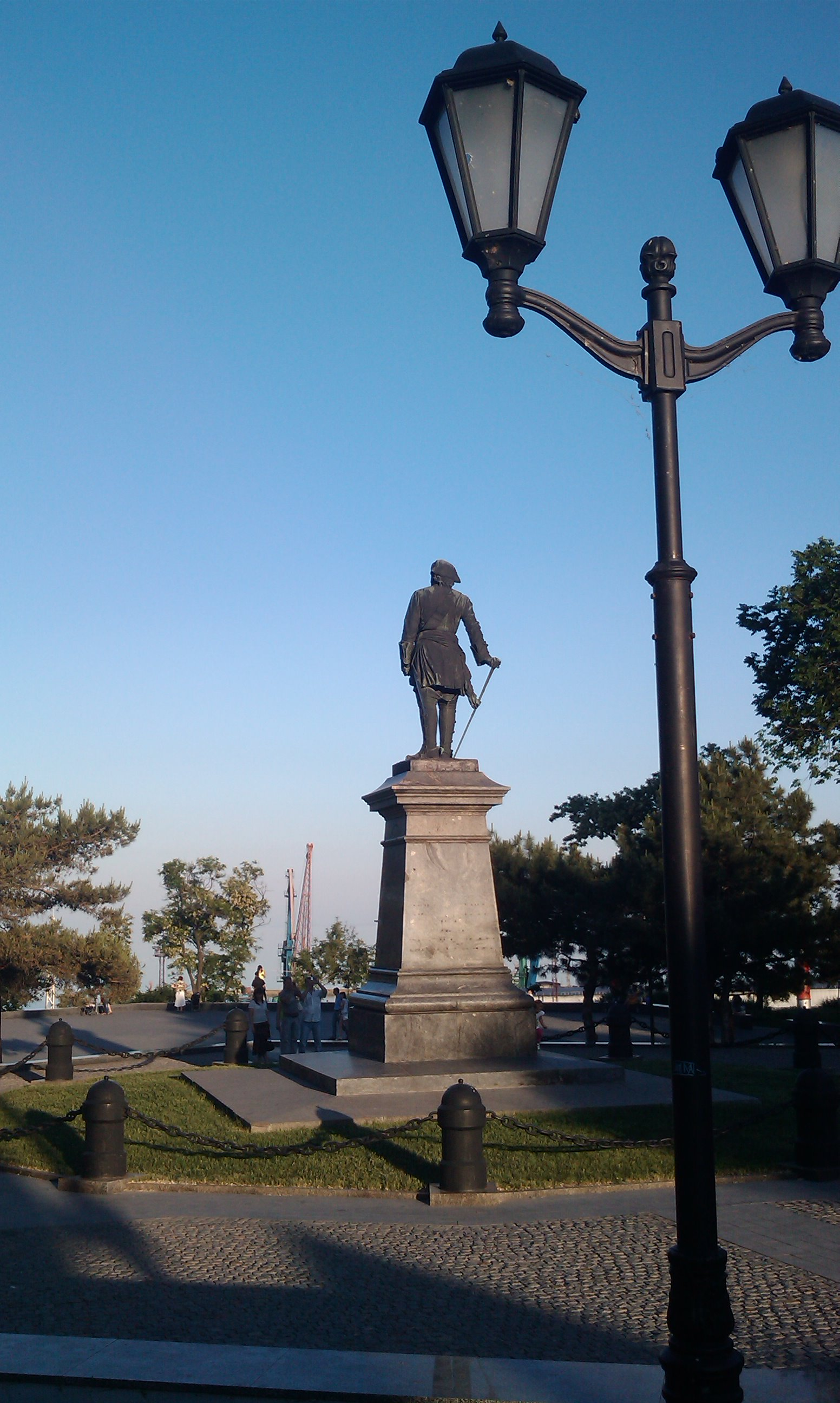 Памятник Петру I, Таганрог, 2011